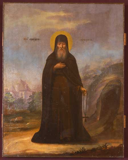 Saint Gregory the Wonderworker of Kyiv Caves Monastery (d. 1093, as a martyr) Преподобномученик Григорій Чудотворець Печерський (? - † 1093 р., р. Дніпро, Київ) — православний святий, чернець Києво-Печерського монастиря. Преподобномученик. Пам'ять 11 жовтня і 21 січня. Пострижений прп. Феодосієм близько 1064 р. Був великим книголюбом і зібрав чималу бібліотеку, яку згодом продав і роздав гроші бідним. Якось, йдучи до Дніпра по воду, він зустрів на шляху дружину Переяславського князя Ростислава Всеволодовича, що прямувала до Треполя (нині село в Обухівському районі Київської області), щоб перепинити шлях половцям. Вояки почали глузувати з ченця, який спробував повчати воїнів і закликав їх до покаяння. Прп. Григорій провістив їм скору загибель, за що його, прив'язавши камінь на шию, втопили у Дніпрі. 26 травня 1093 р., руські війська зазнали нищівної поразки на р. Стугні. Князь Ростислав був смертельно поранений і захлинувся в річці. Коли Володимир Мономах велів поховати свого брата в Софійському соборі, на вівтарній стіні Георгіївського приділу біля усипальниці Ярославичей з'явився звинувачувальний напис: "Месяца мая в 25-е утоплен ГРГОРІИ к(ня)зе(м)". Як оповідає "Патерик Печерський", тіло прп. Григорія на 3-й день після кончини чудом опинилося в його замкненій келії. Іноді Григорія Чудотворця ототожнюють з Григорієм, творцем канонів, можливо, упорядником служб князю Володимиру, преподобному Феодосію Печерському та перенесення мощей святих Бориса і Гліба. Однак "Патерик Печерський" розрізняє цих двох ченців. Мощі прп. Григорія Чудотворця спочивають у Ближніх печерах.